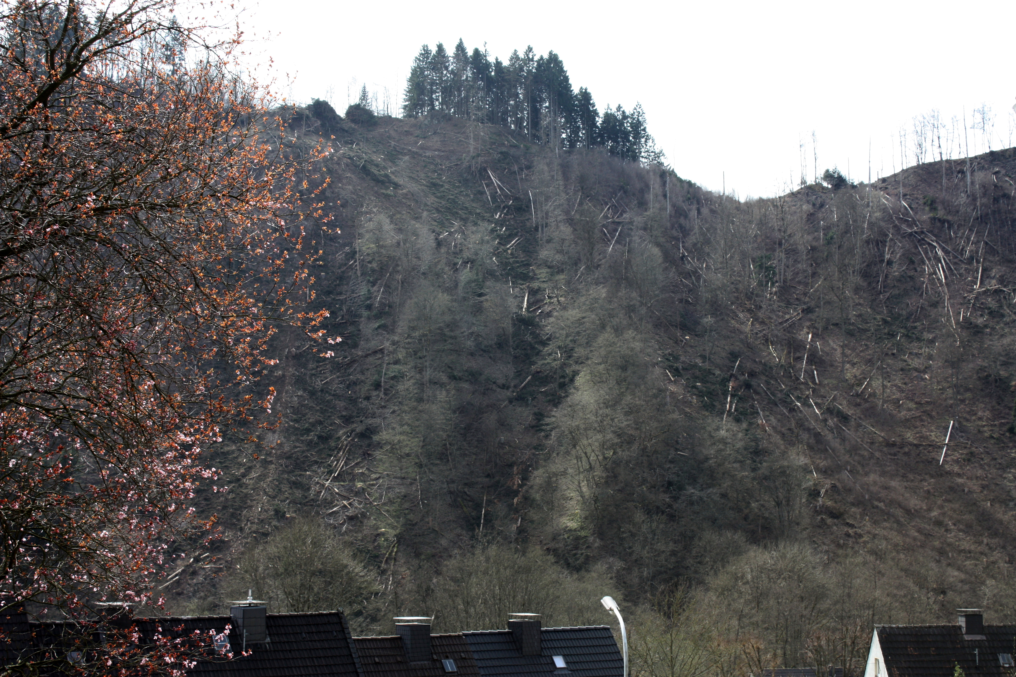 Waldfläche mit Totholz (Fichten) als Folge des Orkan Kyrill vom 17. Januar 2007. Osthang an der Lenne des Naturschutzgebiet MK-008 Eschmecke-Hückenstein in Werdohl. Des Weiteren ist die Fläche ein Teil des FFH-Gebietes „Schluchtwälder im Lennetal“ (DE-4712-301). IMG 6464